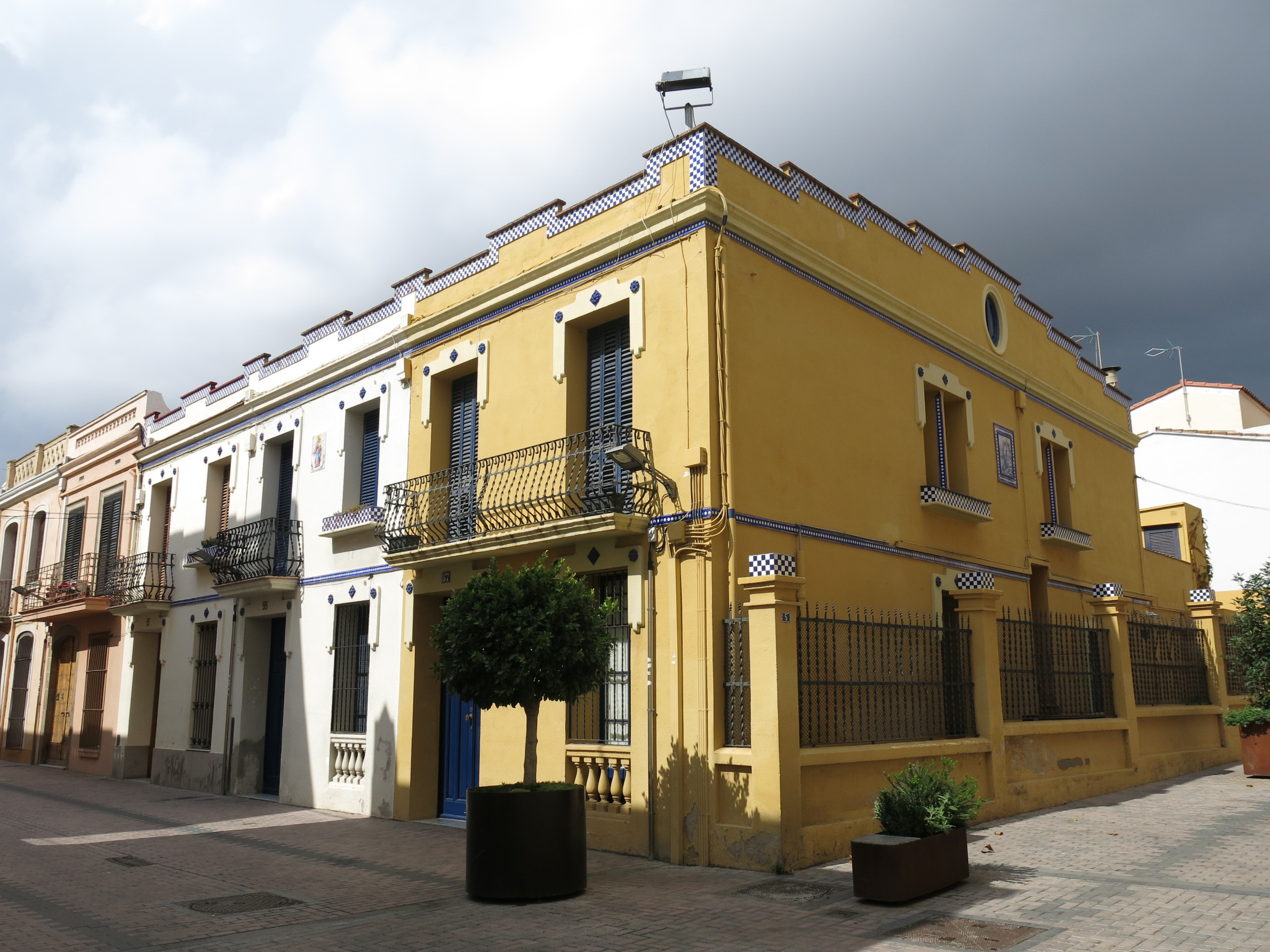 Cases al carrer de Gibraltar (Premià de Mar)